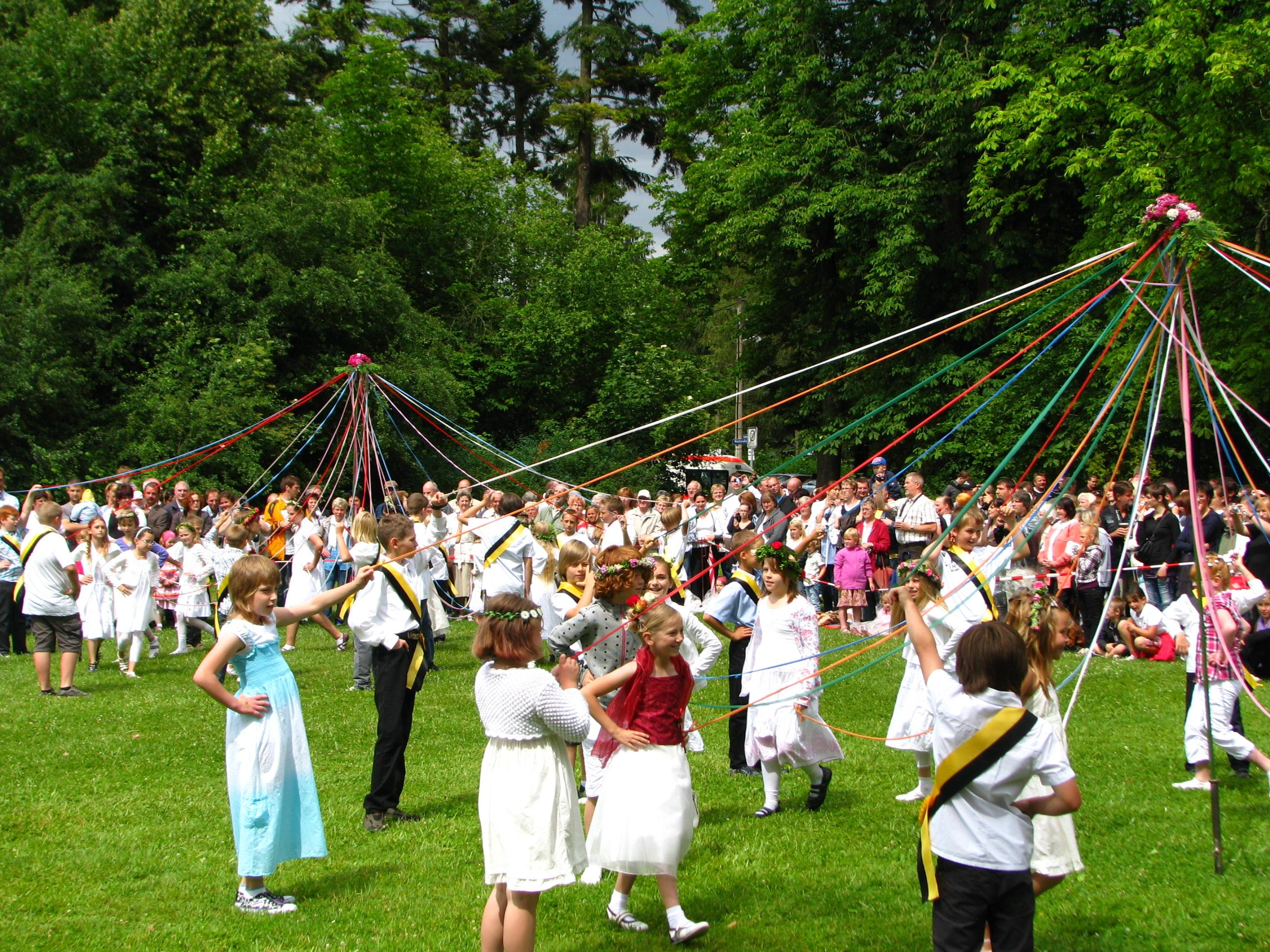 Der Bändertanz, vorgeführt von Schülern der Mühlhäuser Nikolai-Grundschule, ist ein traditionell zum Mühlhäuser Brunnenfest getanzter Tanz.